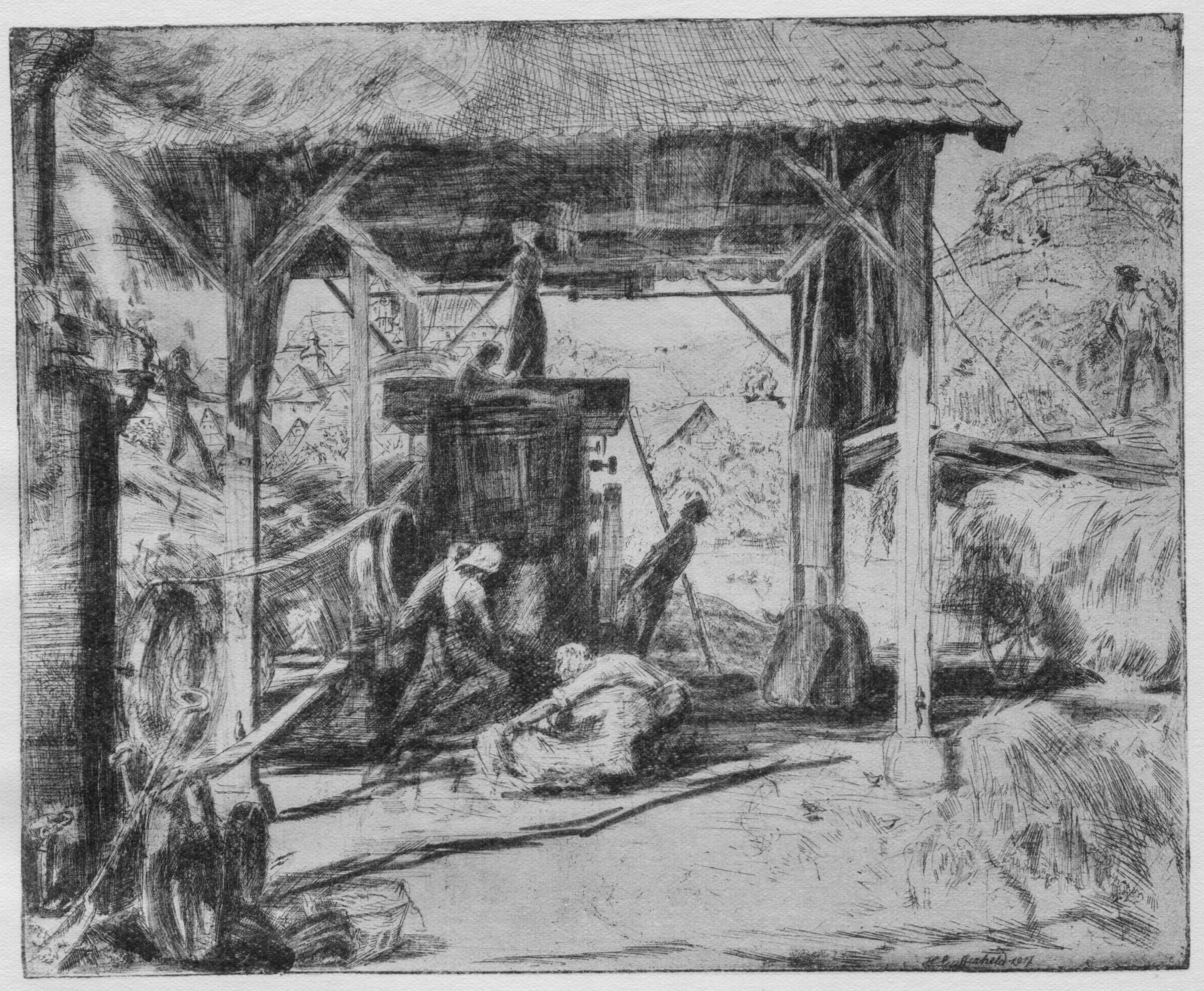 Dreschmaschine. Im Hintergrund links Weinsberg, rechts die Burgruine Weibertreu. Op. 126,1 im Katalog der Radierungen. Strichätzung, Roulette und Kaltnadel, auf Zink, Plattengröße 215×264 mm